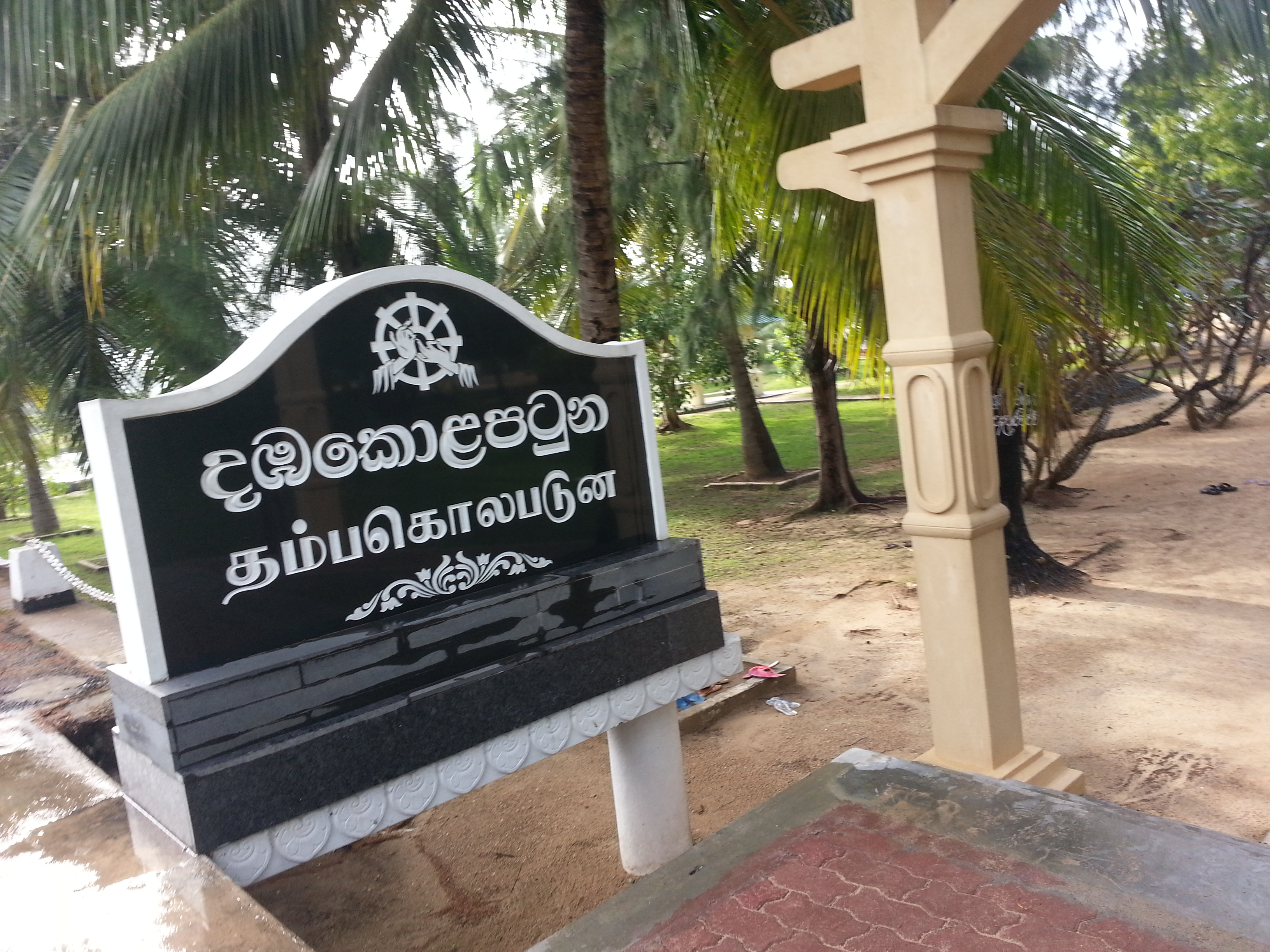 ஜம்புகோளப்பட்டினம்